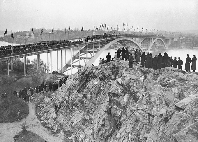 Västerbron i Stockholm, vid invigningen 1935